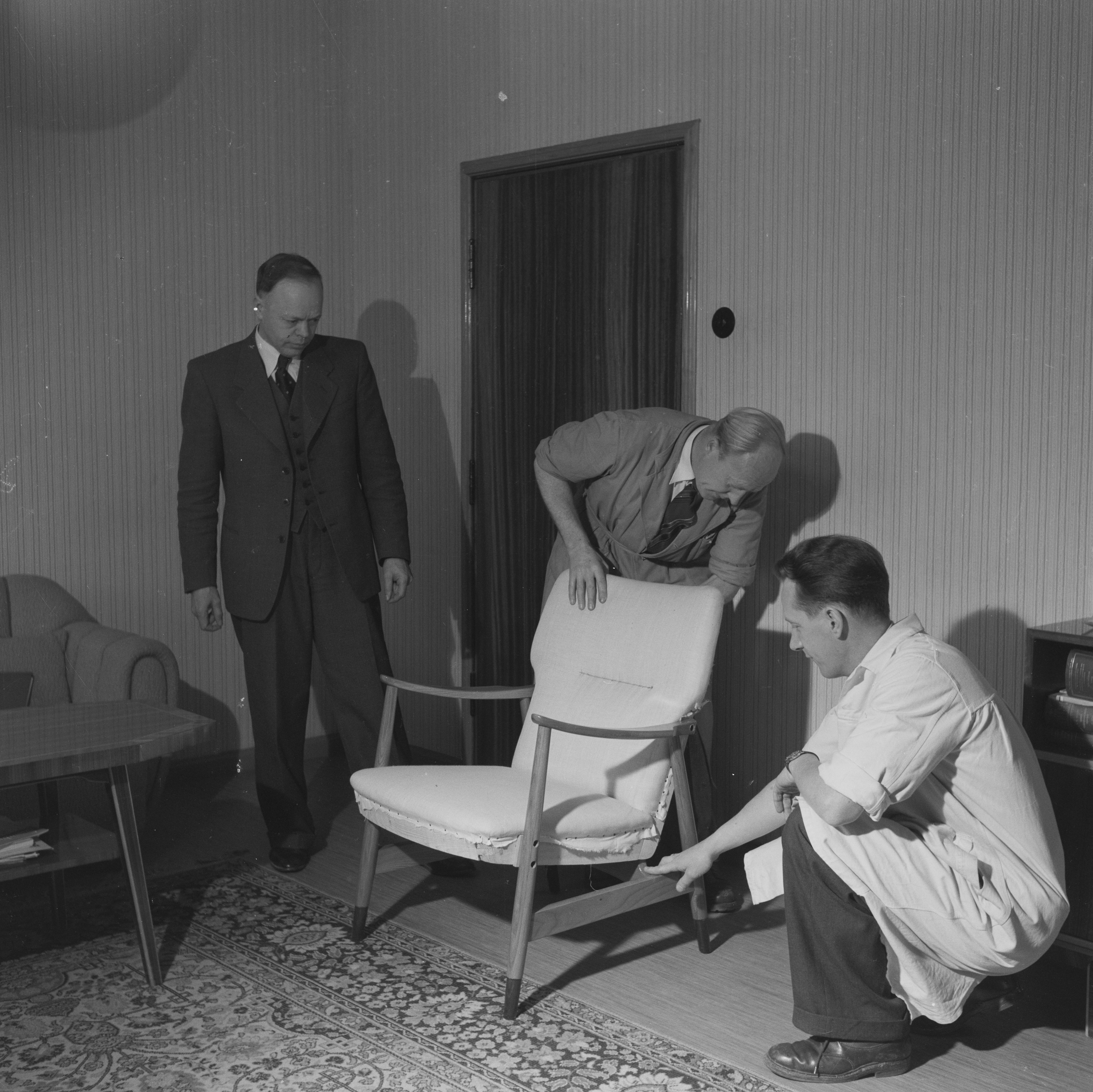 Bildet er hentet fra Arkivverket. P. I. Langlos Fabrikker, Stranda. NÅ nr. 1, 1953 Arkivinstitusjon : Riksarkivet Arkivnavn : Billedbladet NÅ Sted : Norge, Møre og Romsdal, Stranda, Emneord: Menn, Stol, P.I. Langlos Fabrikker, Sunnmøre, Industri, Møbelfabrikk, Møbler, Næringsliv, Arbeid Avbildet